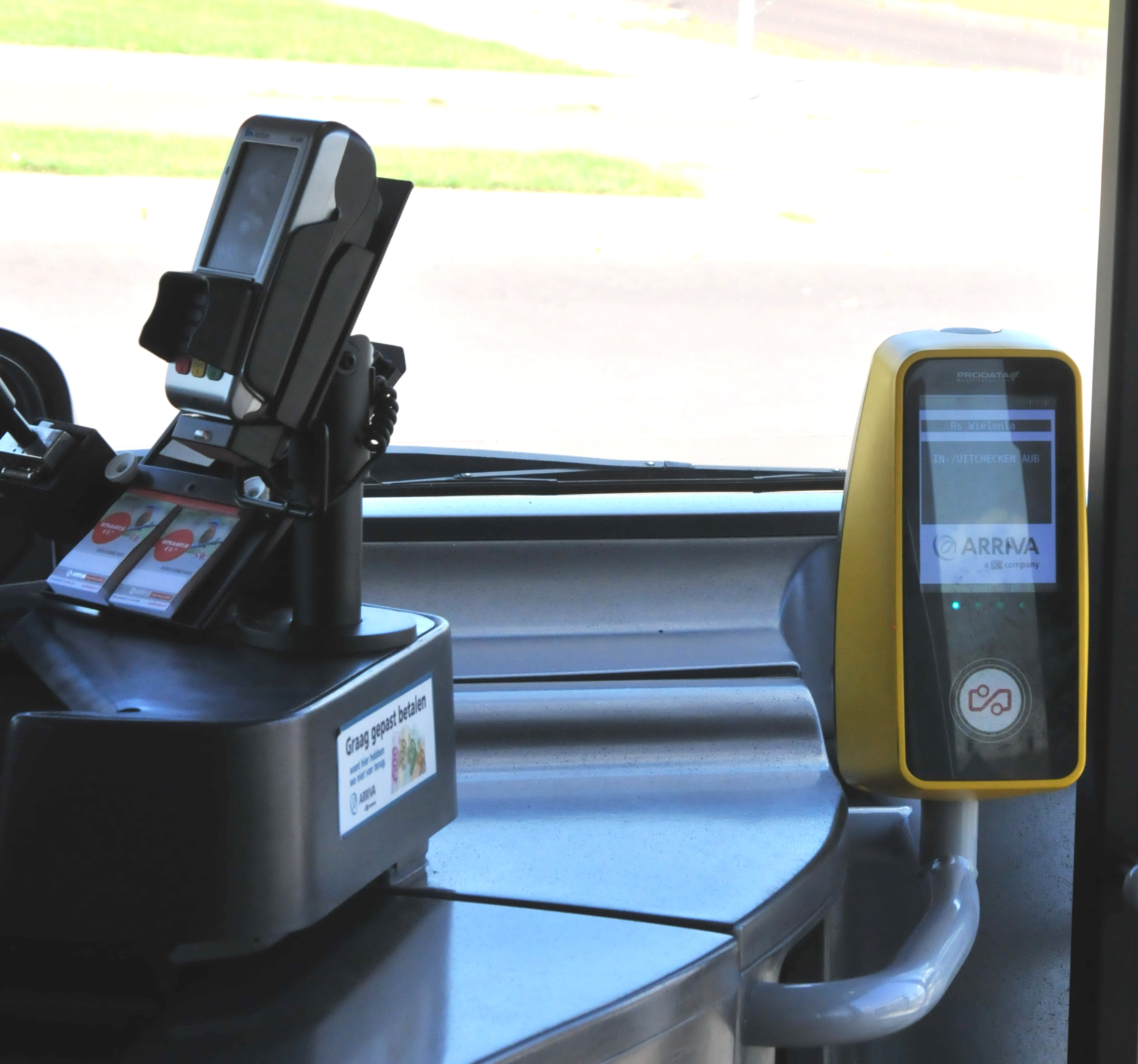 Mobiel pinapparaat en OV-Chipkaart lezer van Arriva Personenvervoer Nederland.